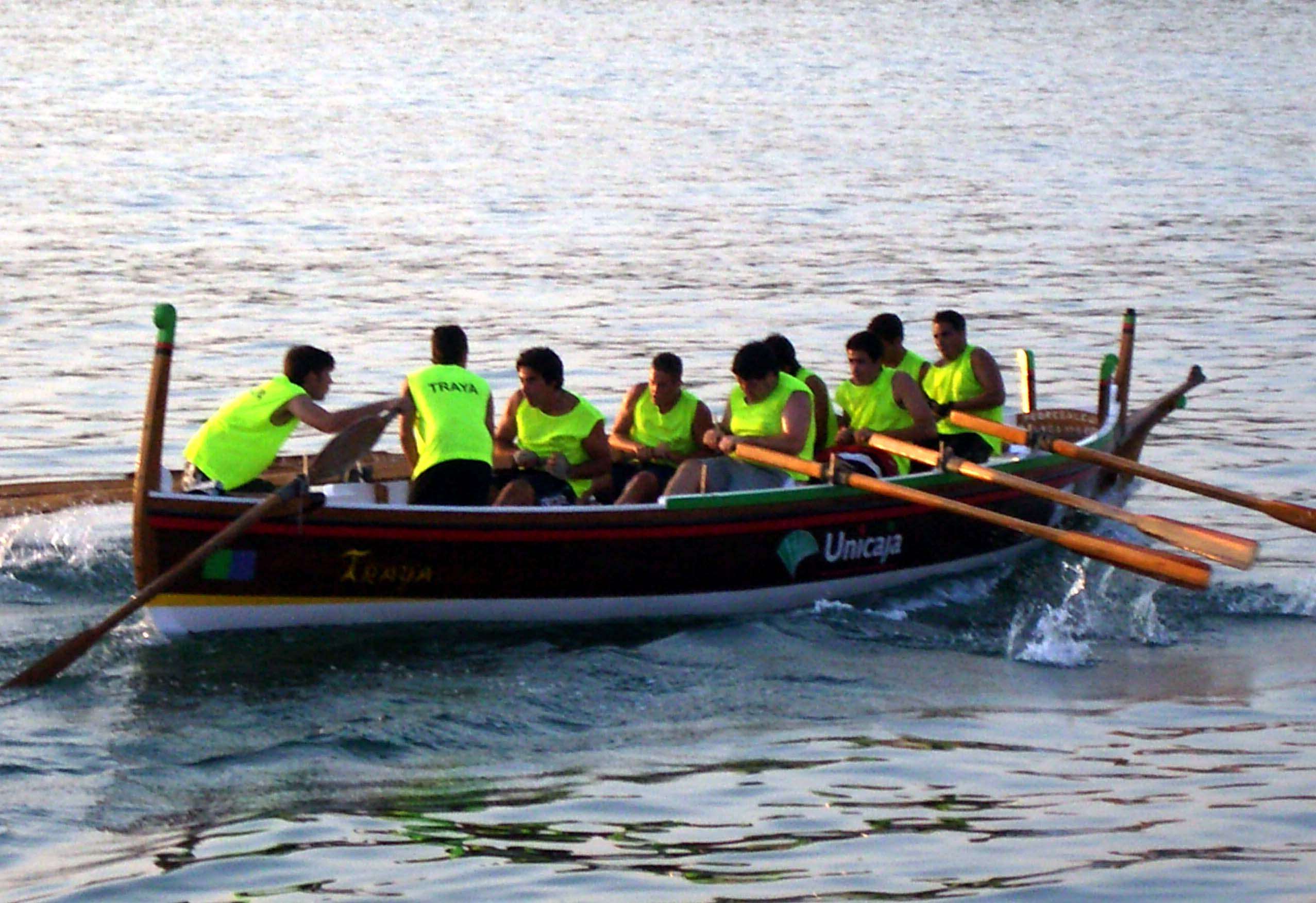 Barca de jábega de la provincia de Málaga